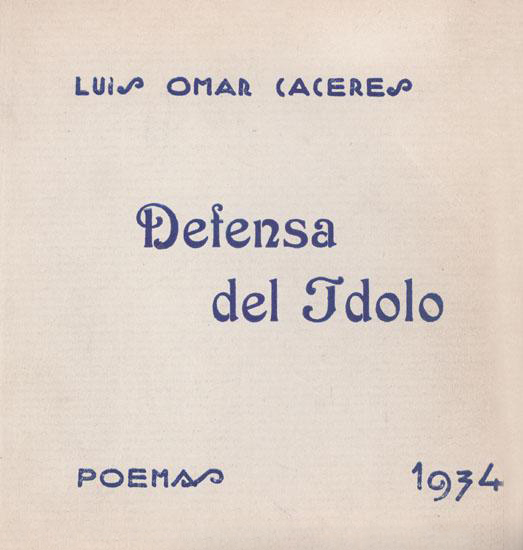 Portada original de "Defensa del ídolo" (1934), poemario del chileno Omar Cáceres